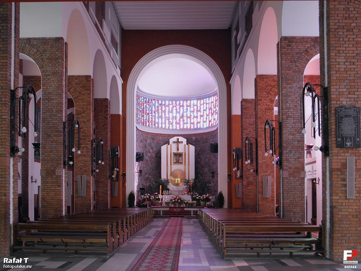 Wnętrze głowaczowskiej świątyni w niebiesko-czerwonym świetle padającym przez witraże.